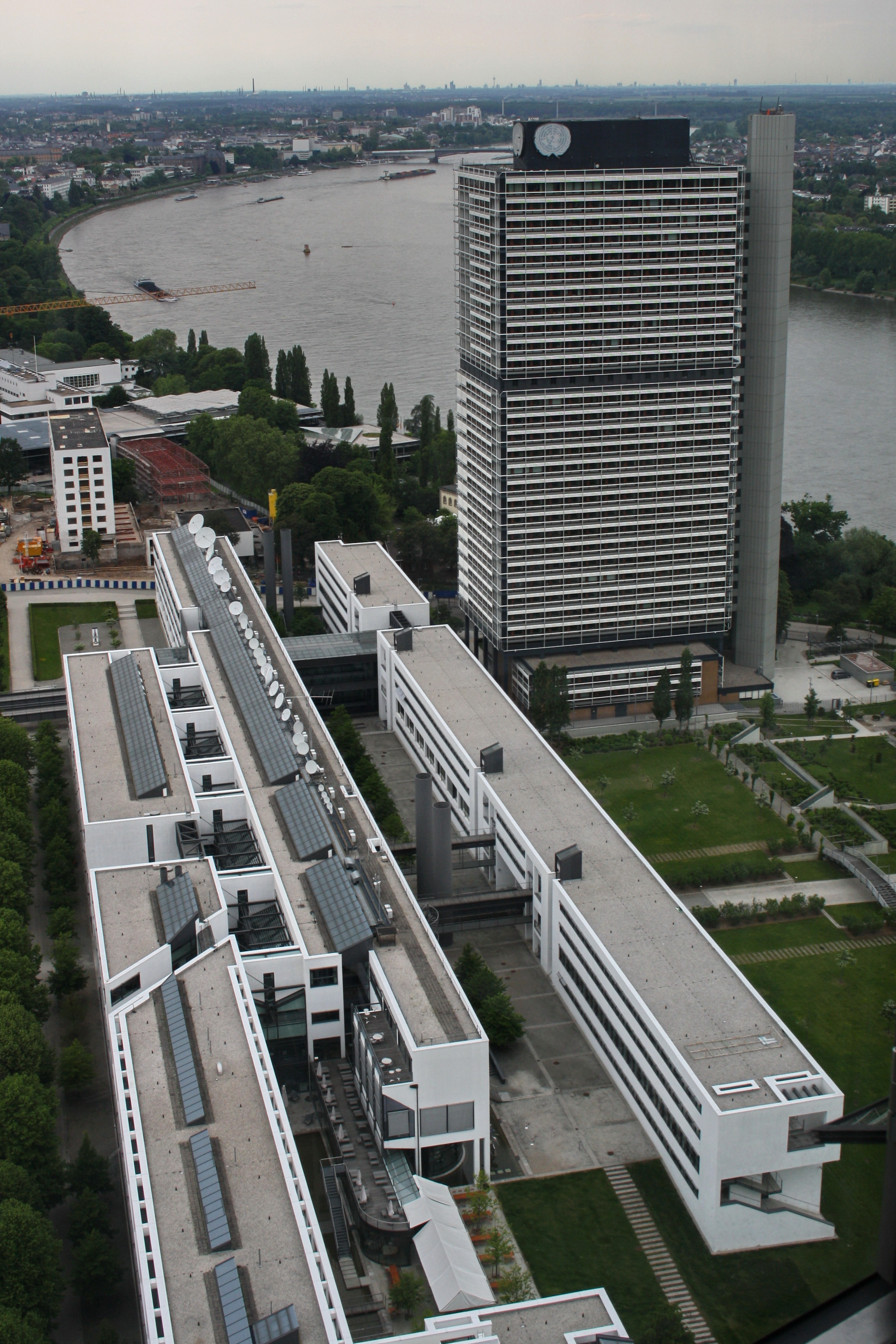 Langer Eugen - Deutsche Welle UN Campus vom Post Tower